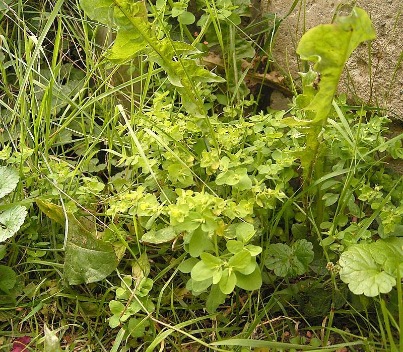 Euphorbia peplus